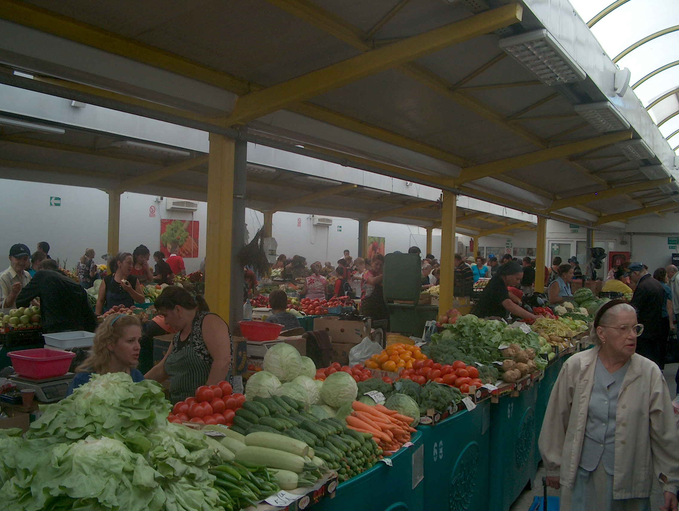 Piaţa Matache din Bucureşti, România